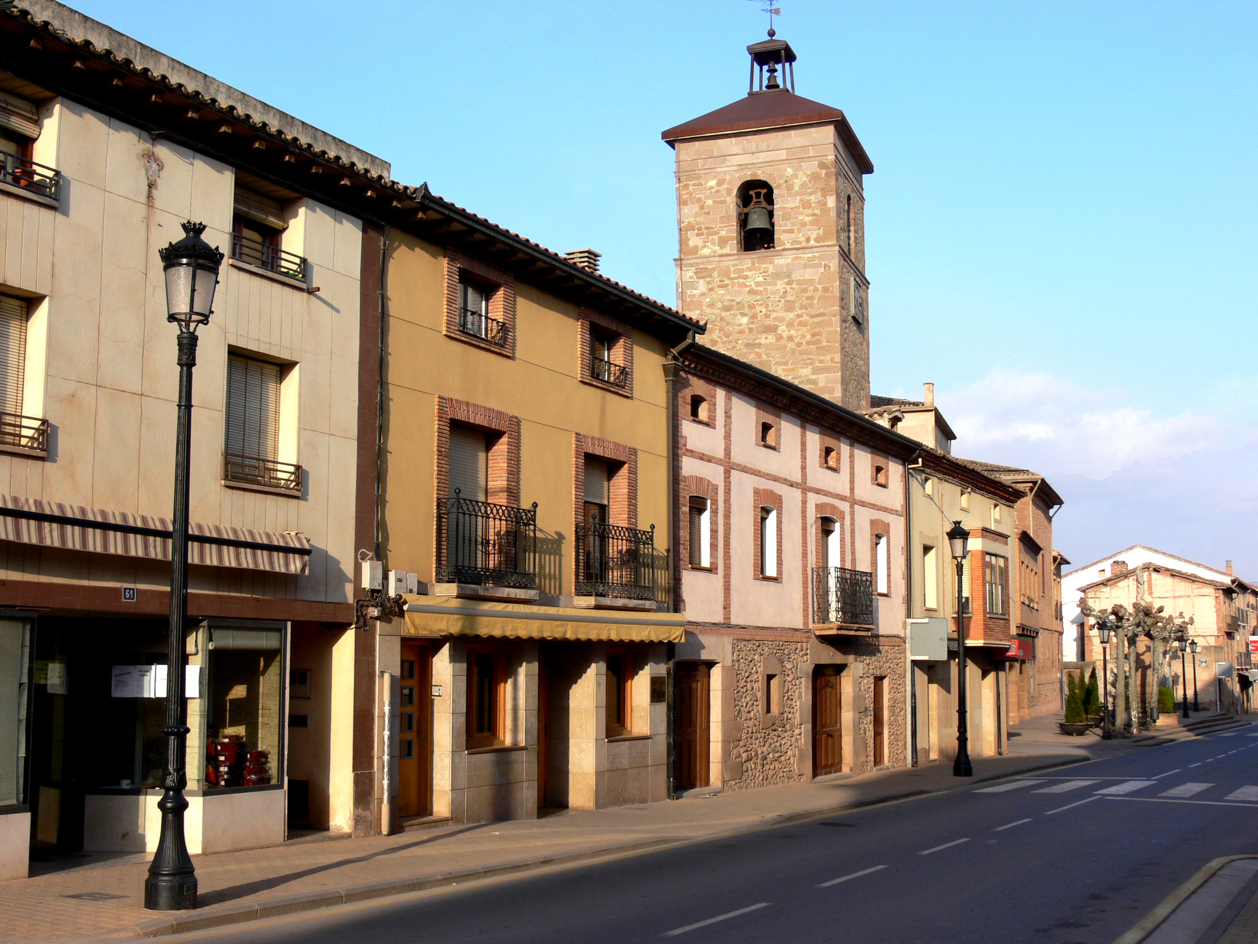 Una calle de Badarán (La Rioja)